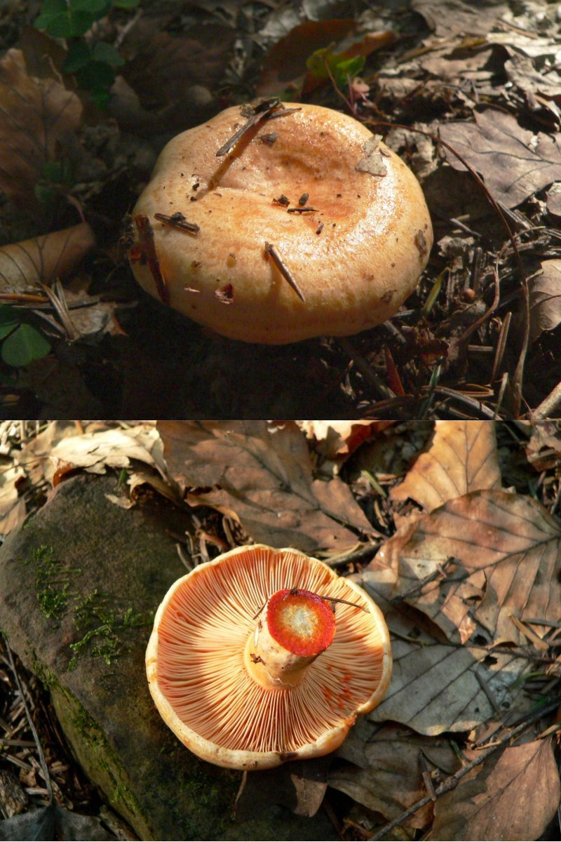 Mleczaj rydz (Lactarius deliciosus) - wierzch kapelusza oraz ujęcie od spodu (widoczne pomarańczowe mleczko na powierzchni przekroju)